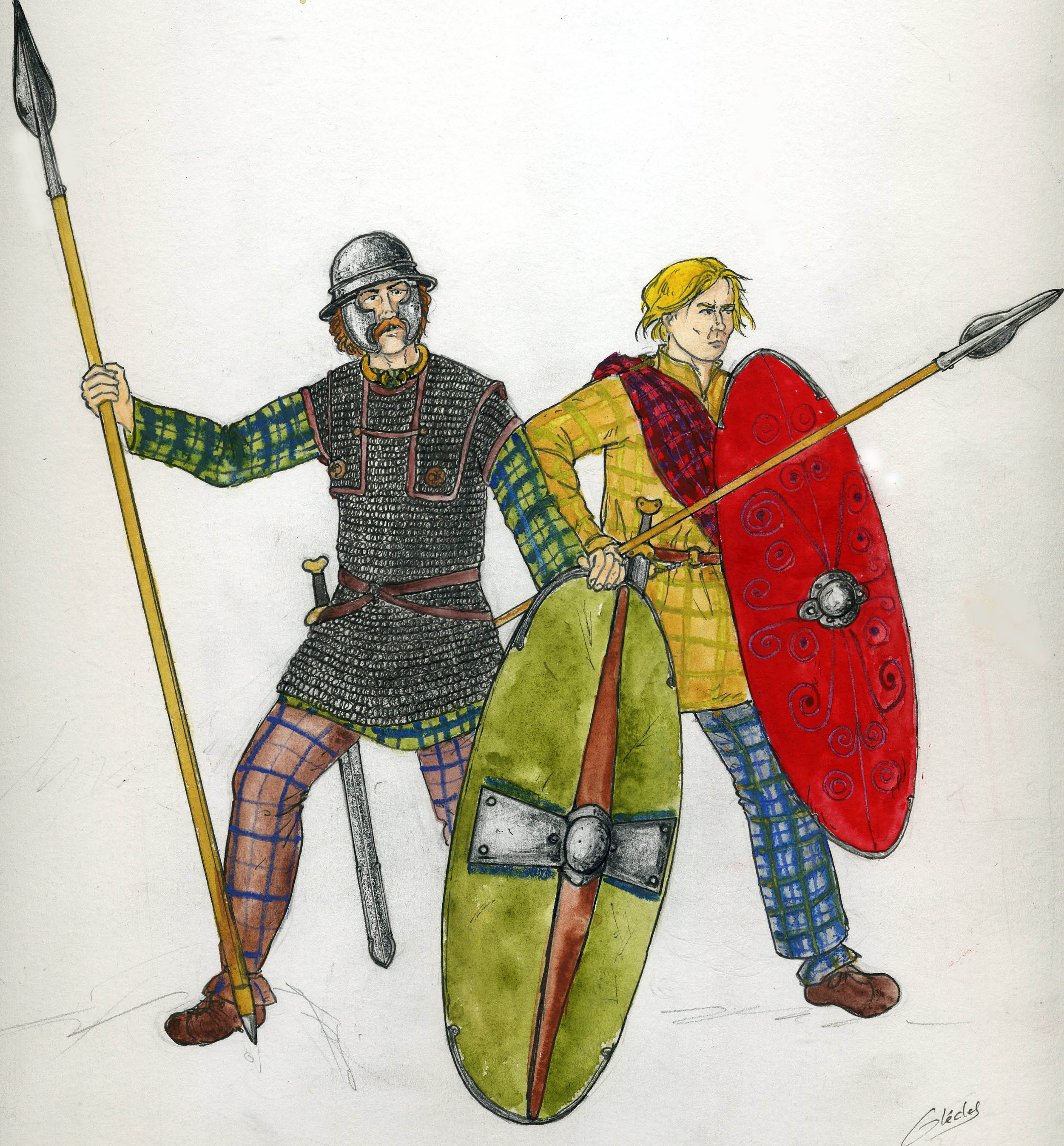 Guerriers celtes gaulois, Ier siècle av JC